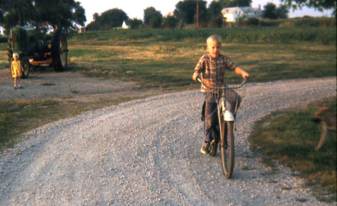 William Cameron McCool bei seinem Großvater in Hoyleton Township, Washington County, IllinoisIm Hintergrund steht seine Schwester KirstieTraktor ist 1949 Modell A John Deere, Ansicht nach Nordosten Richtung Wohnhaus Alfred RixmannJunge Hündin am rechten Bildrand heißt "Ginger"Fahrradhersteller Schwinn, "balloon tire", ohne Gangschaltung, seiner Mutter Audrey geb. Huck gehörend